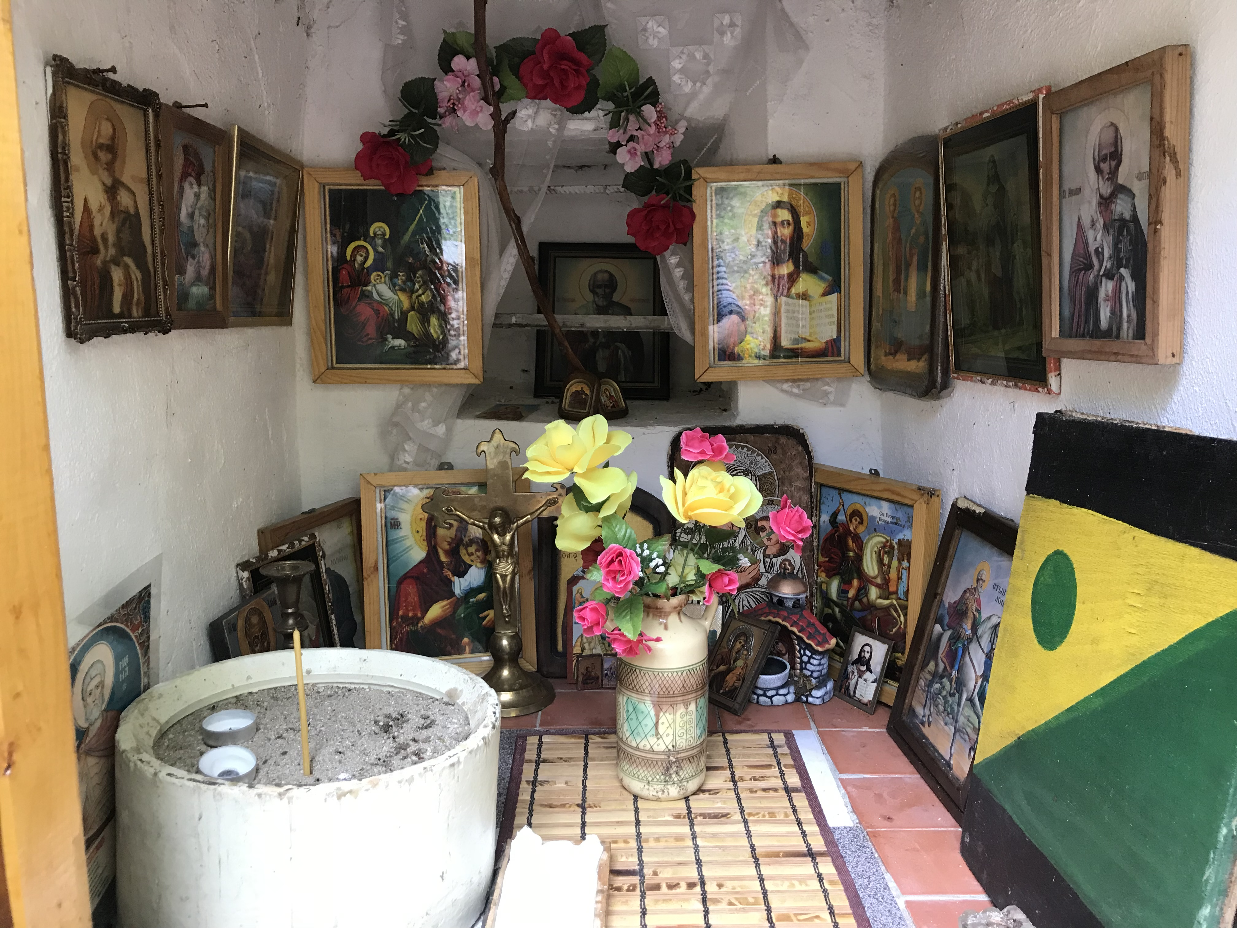 Олтар в параклис “Св. Николай”